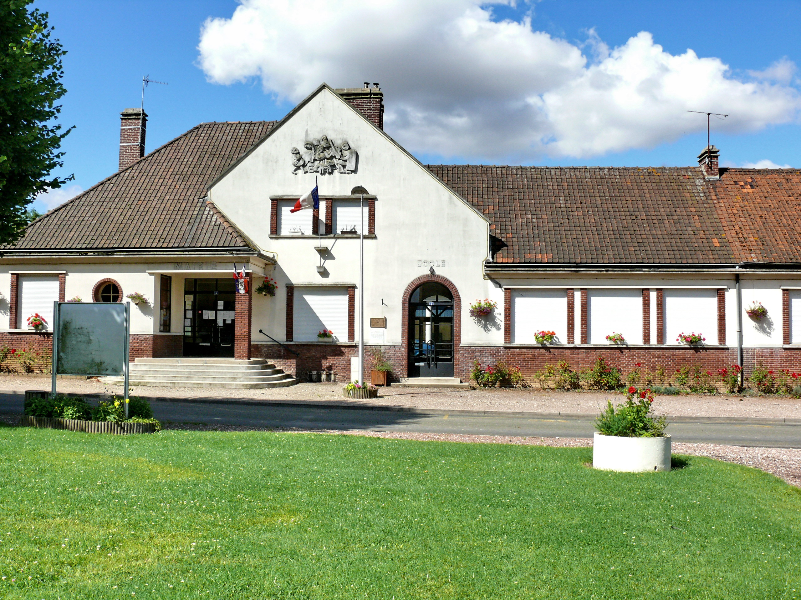 Bosquel (Somme - Picardie - France) : La mairie-école